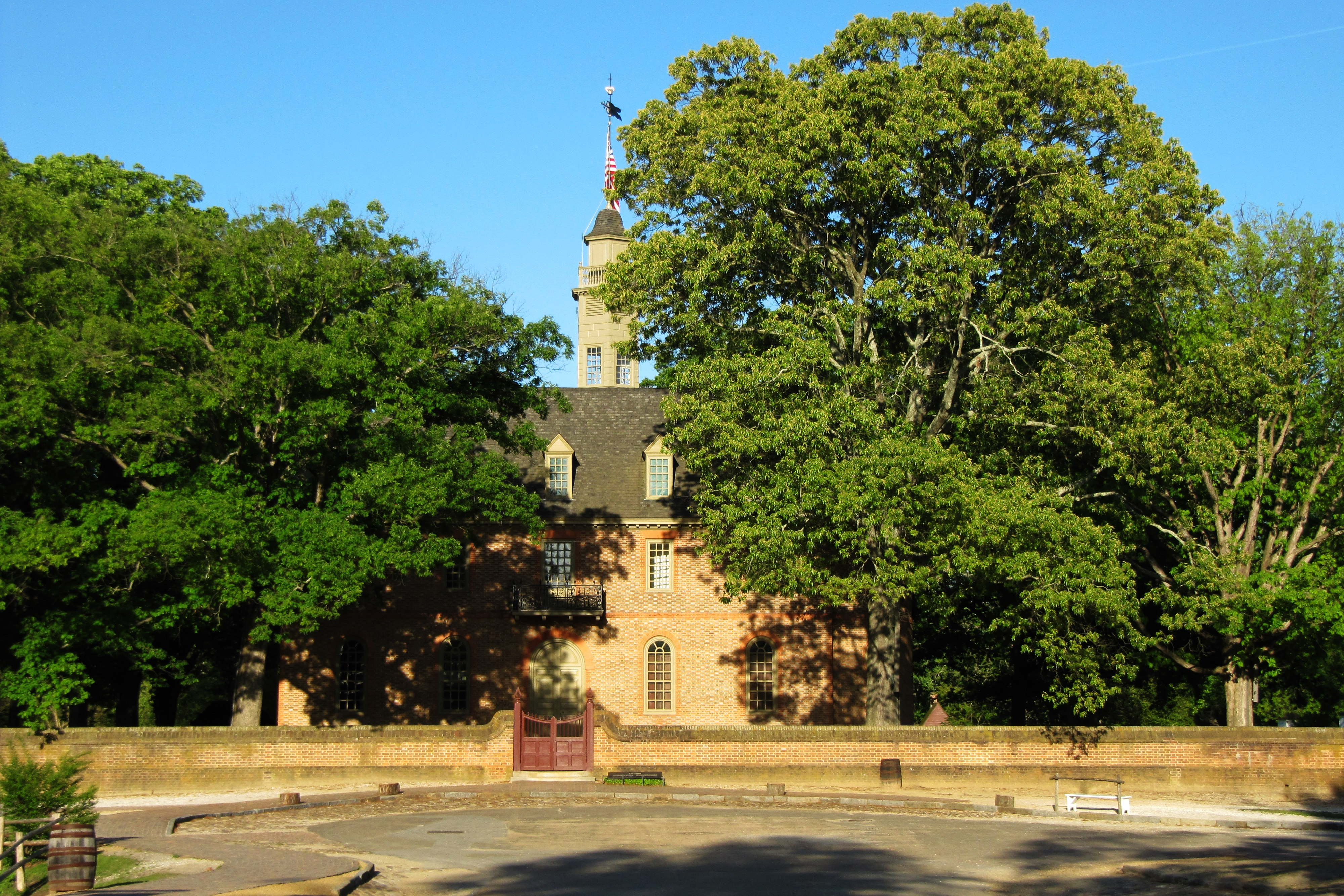 Das Kapitol in Colonial Williamsburg aus dem Jahre 1701/05